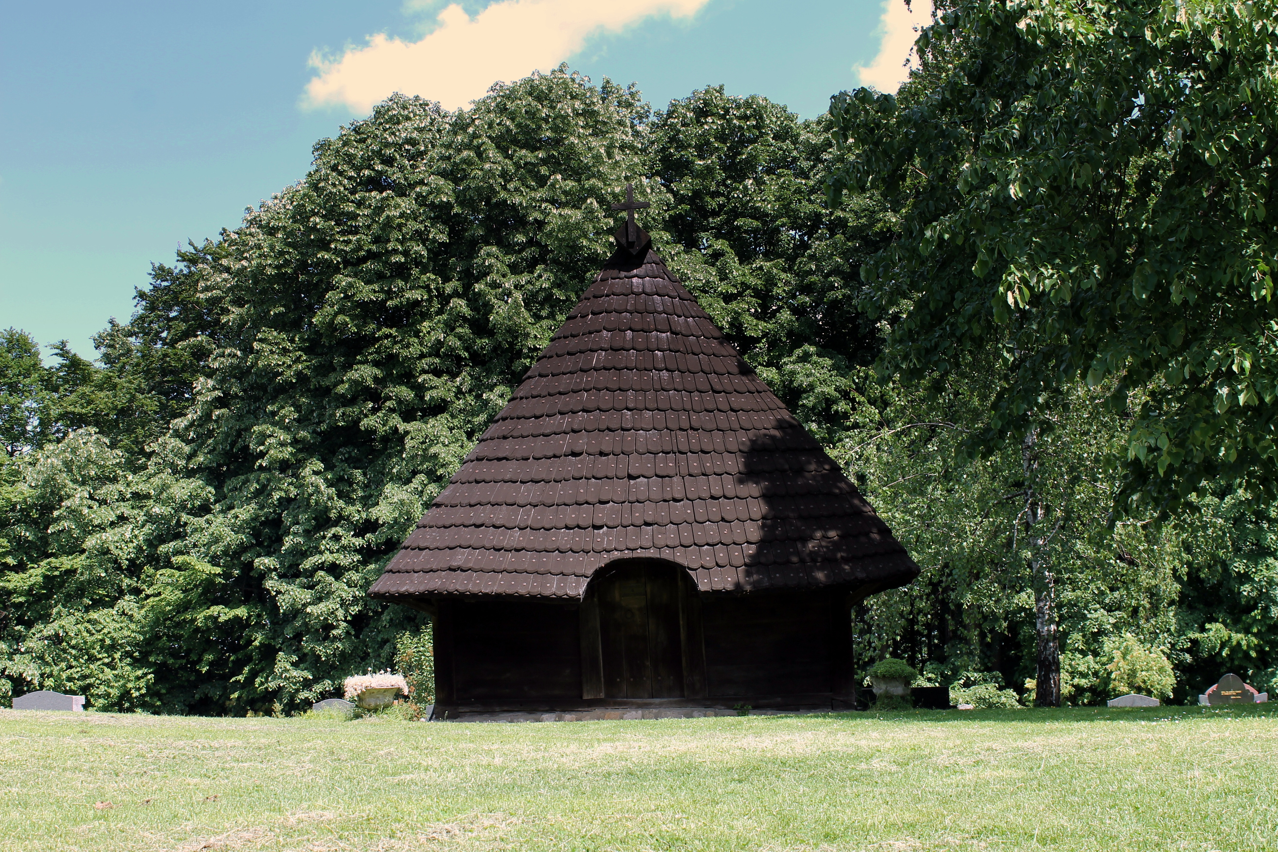 Crkva brvnara u Malom Blaškom This image was uploaded as part of Trace of Soul 2018.